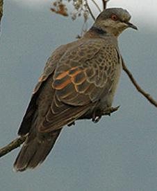 Uganda Dusky Turtle-dove Streptopelia lugens